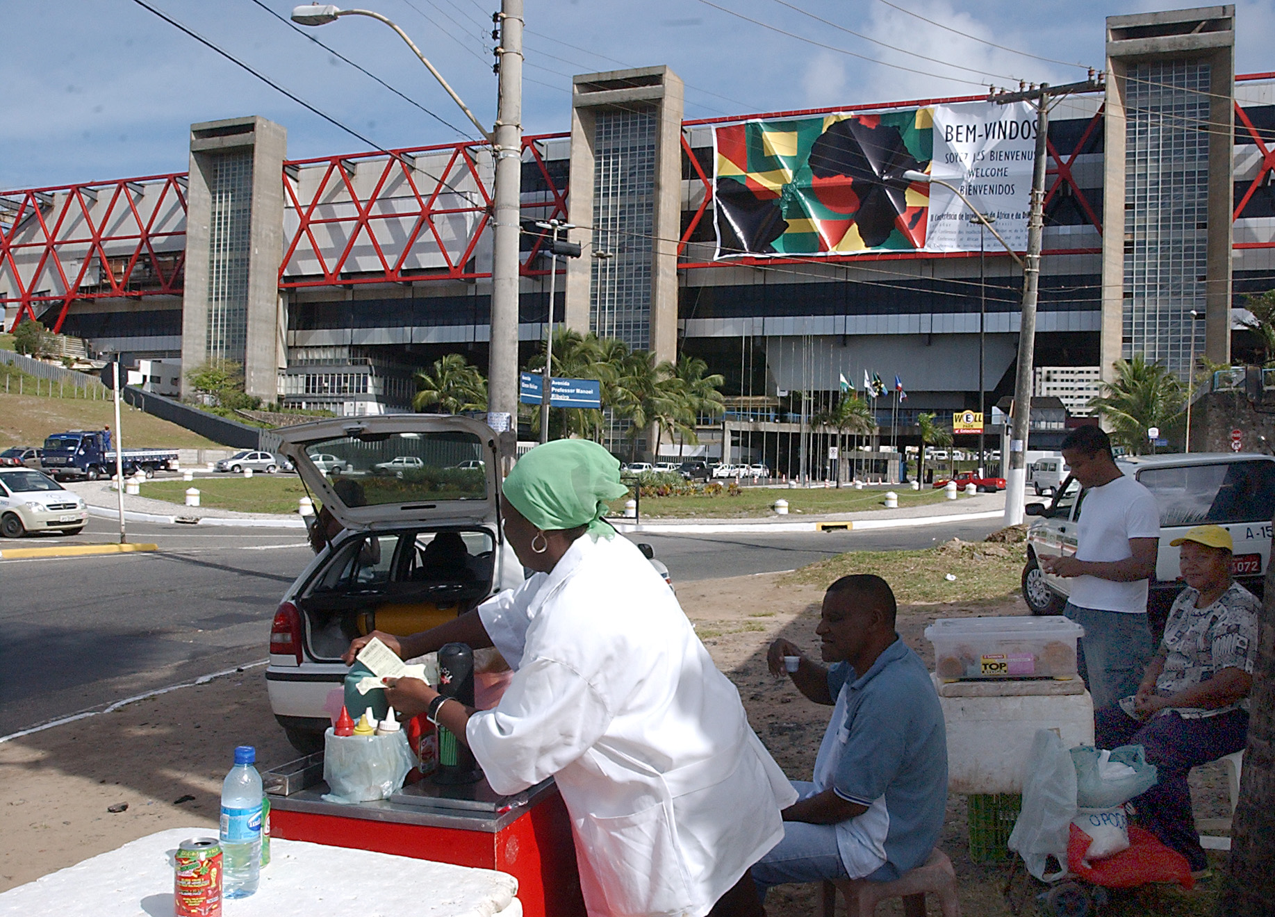 Ambulantes trabalham em frente ao Centro de Convenções de Salvador, onde se realiza a 2ª Conferência de Intelectuais da África e da Diáspora, Salvador (BA).